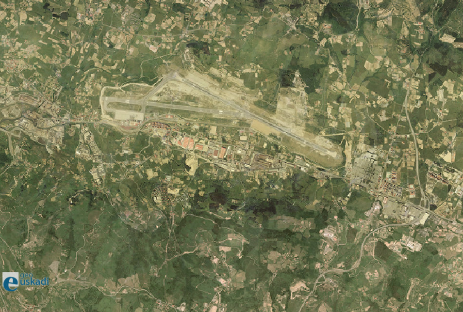 Bilboko aireportuaren ortoargazkia